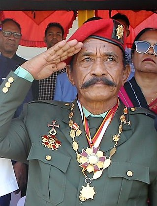 Cornélio da Conceição Gama bei den Feierlichkeiten zum Proklamationstag 2019